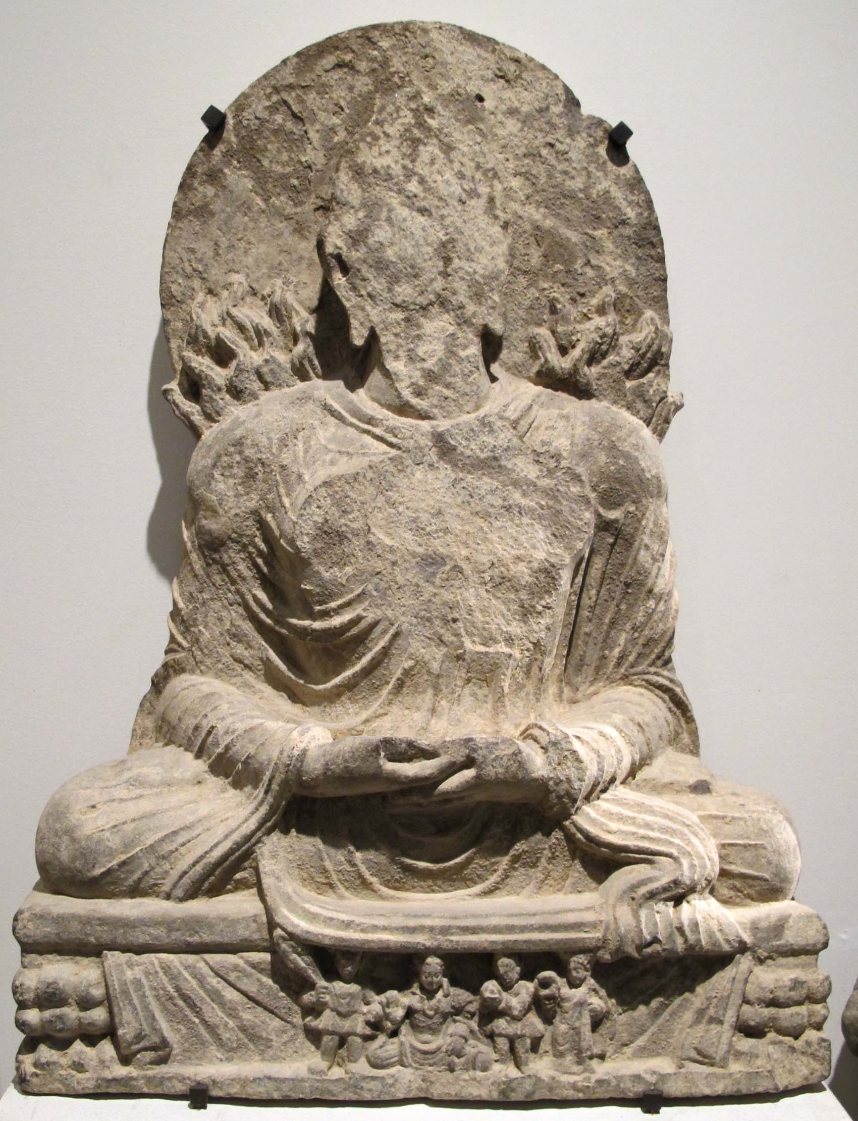 Afghanistan, bodhisattva meditante, regione di kapiça, monastero di shotorak, II-III sec.